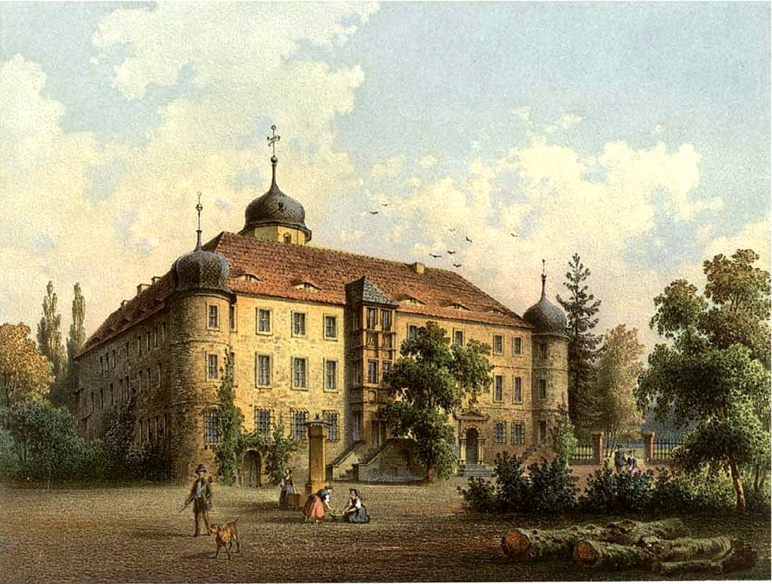 Schloss Unterfrankleben, Kreis Merseburg